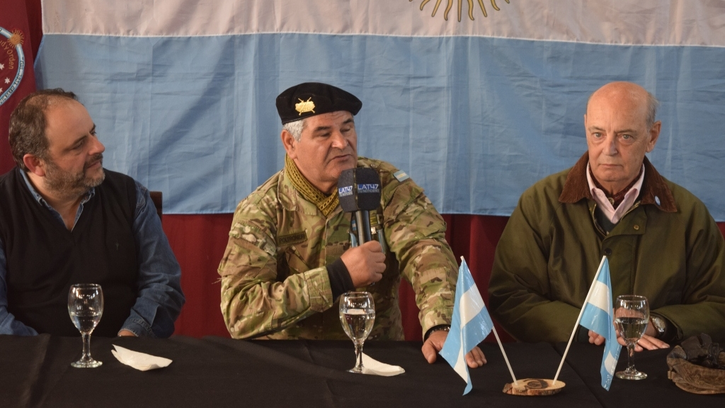 Exsoldado VGM Oscar Poltronieri en el Regimiento de Caballería de Tanques 9 en Puerto Deseado.